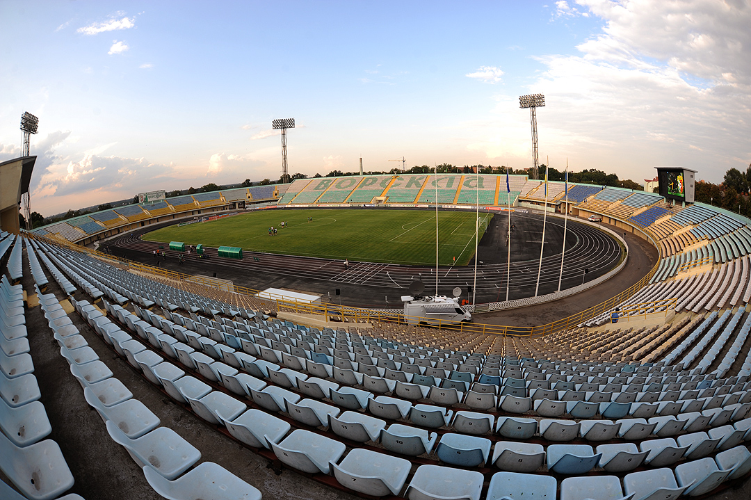 Стадион Ворскла